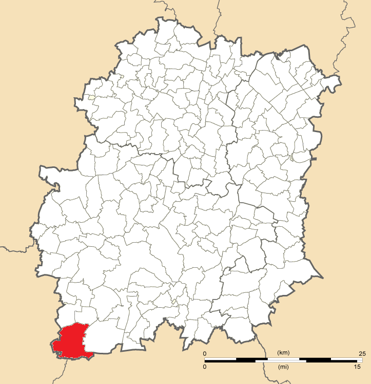 Carte de position d'Angerville en Essonne (91)